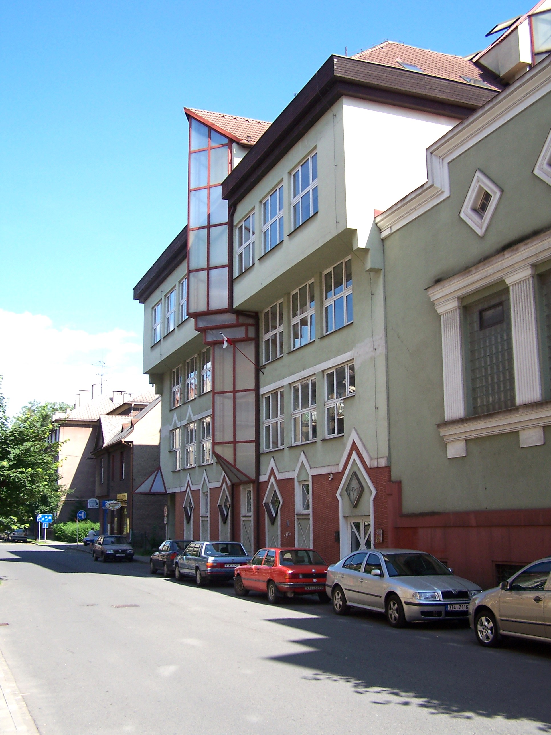 Polish grammar school (gymnasium) in Český Těšín (Czeski Cieszyn)